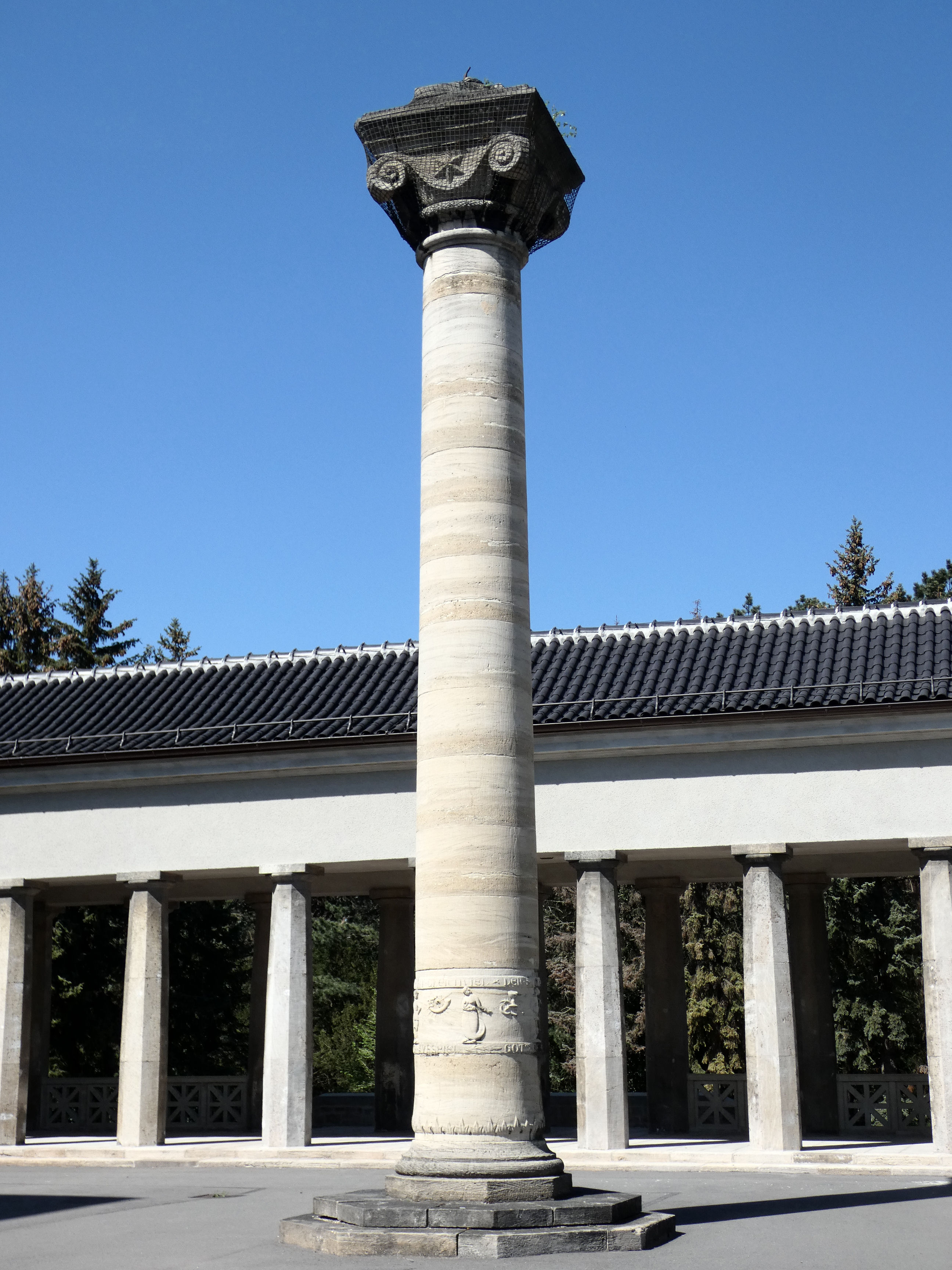 Gertraudenfriedhof Halle, Malsäule von Paul Horn mit Relief von Richard Horn